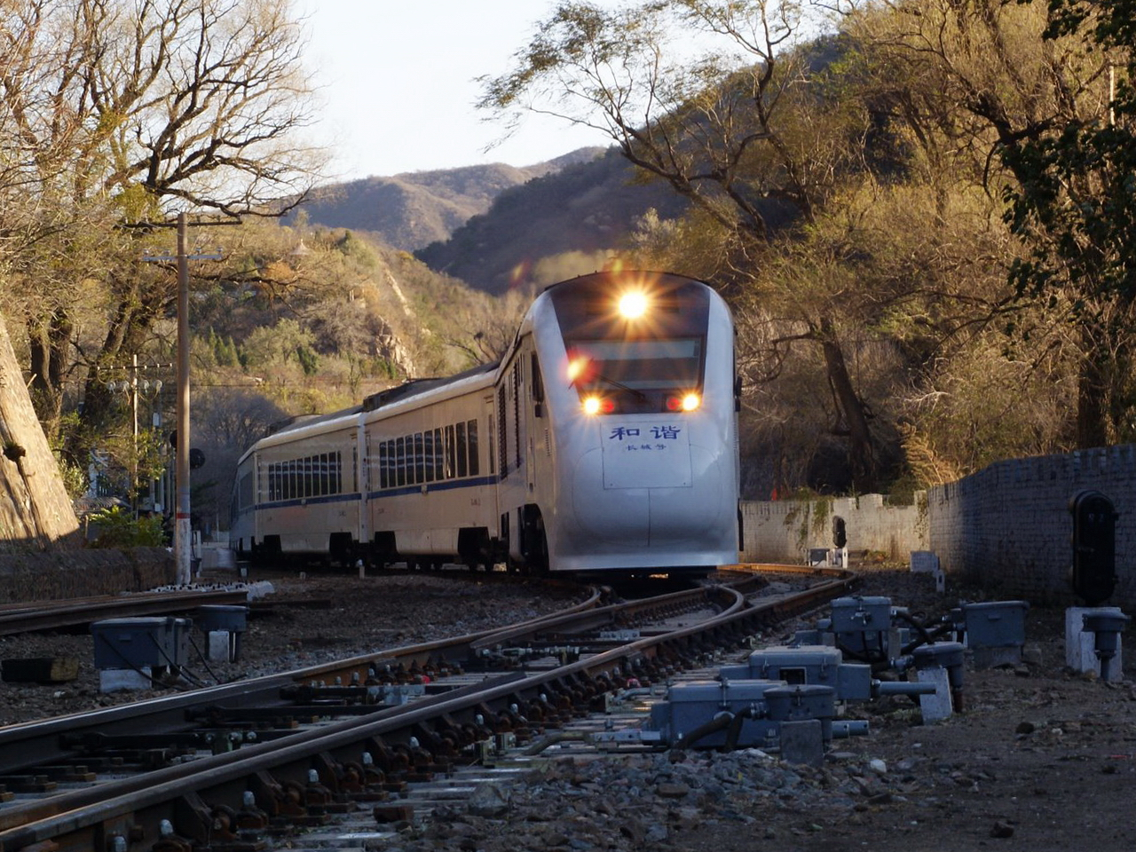 和谐长城号 @ 青龙桥车站 / 和諧長城號 @ 靑龍橋車站